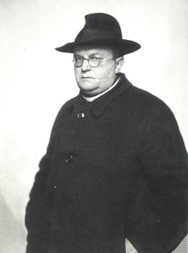 Porträt des Priesters Carl Sonnenschein.